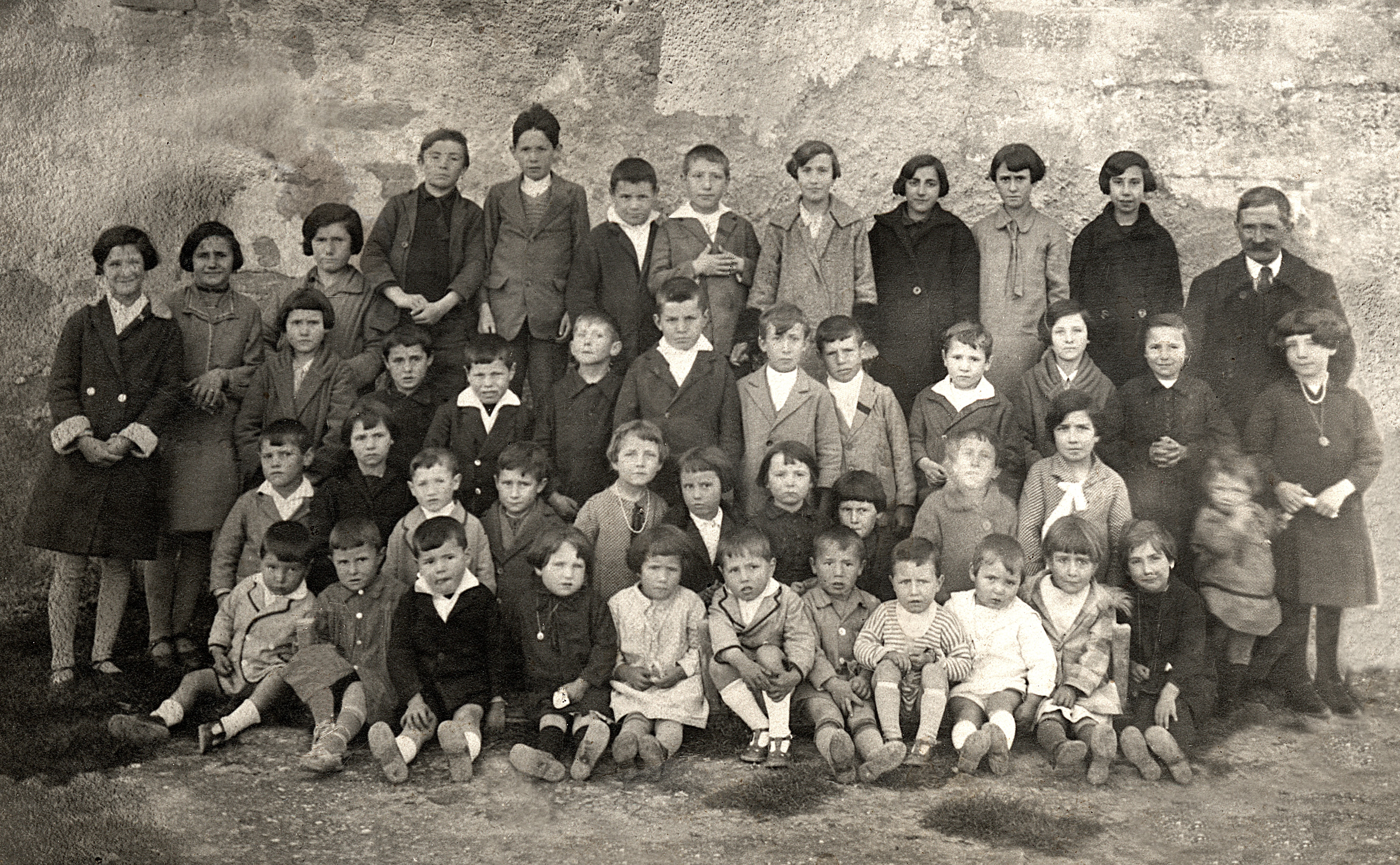 Foto de alumnos de la escuela de Tirapu en 1925a. D. José Casi (Arriba Derecha) maestro años 1918-1946